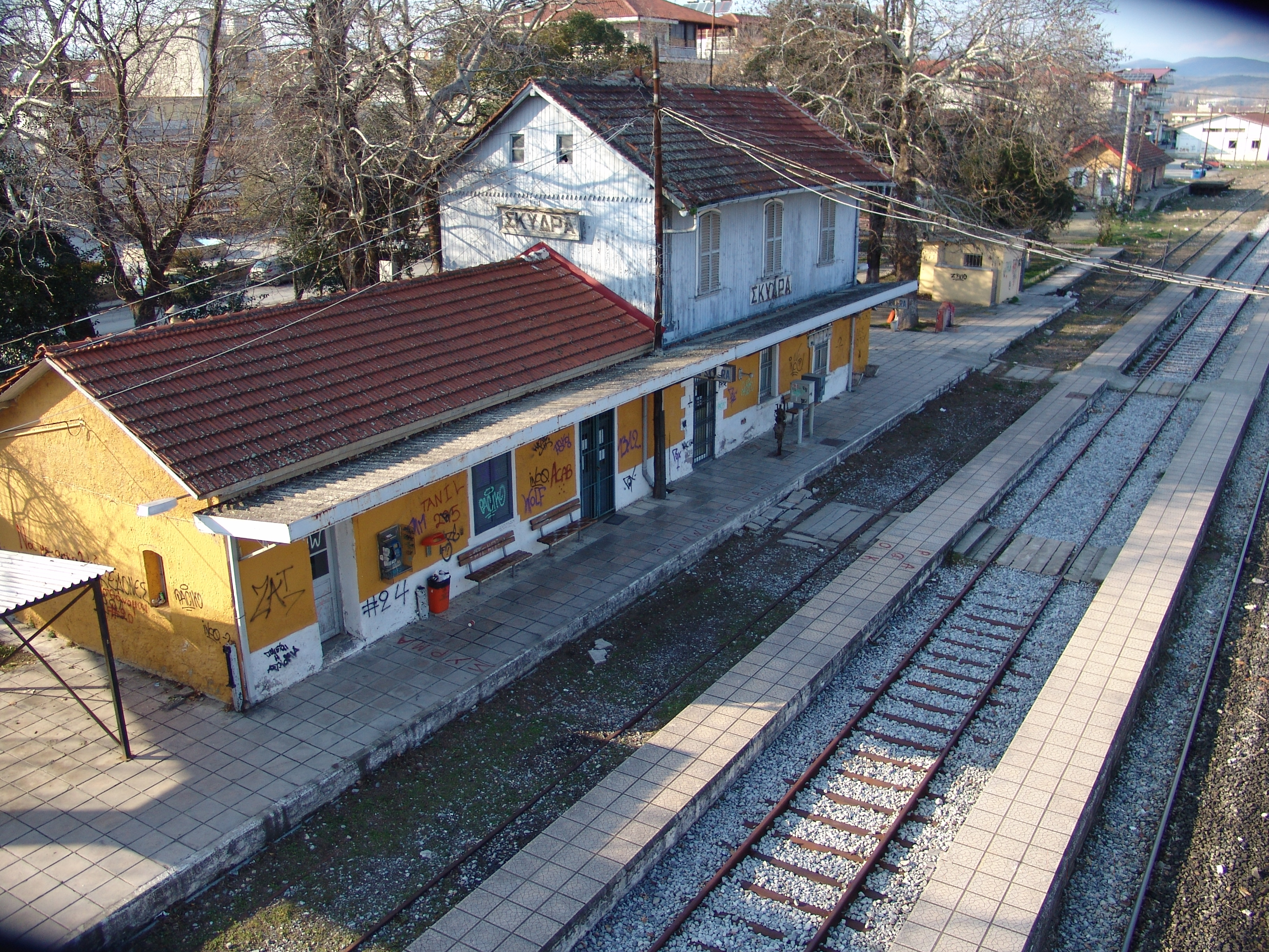 Παλιός σιδηροδρομικός σταθμός Σκύδρας«Παλιός σιδηροδρομικός σταθμός Σκύδρας»